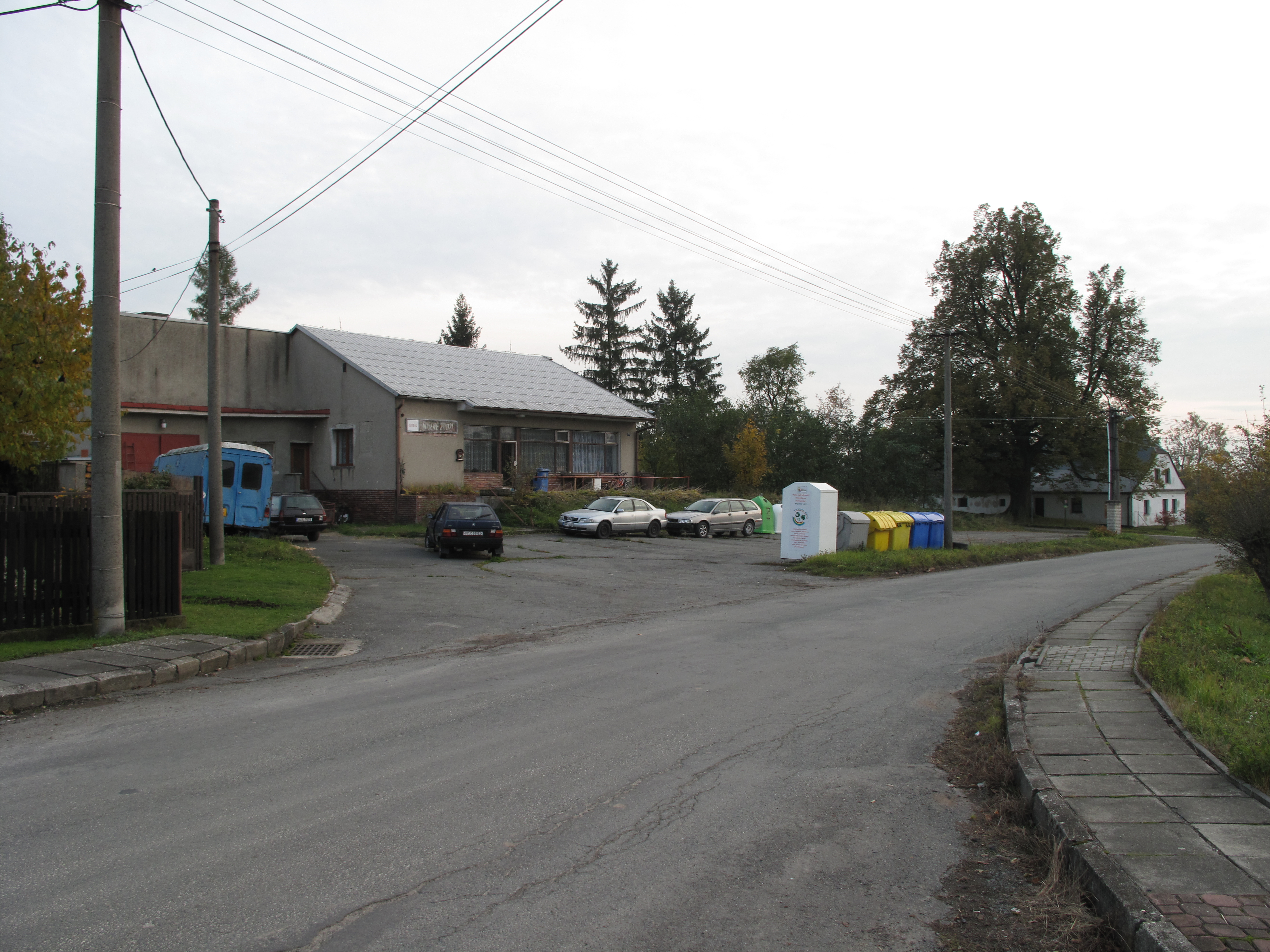 Dalov (Šternberk, okres Olomouc), Česká republika.